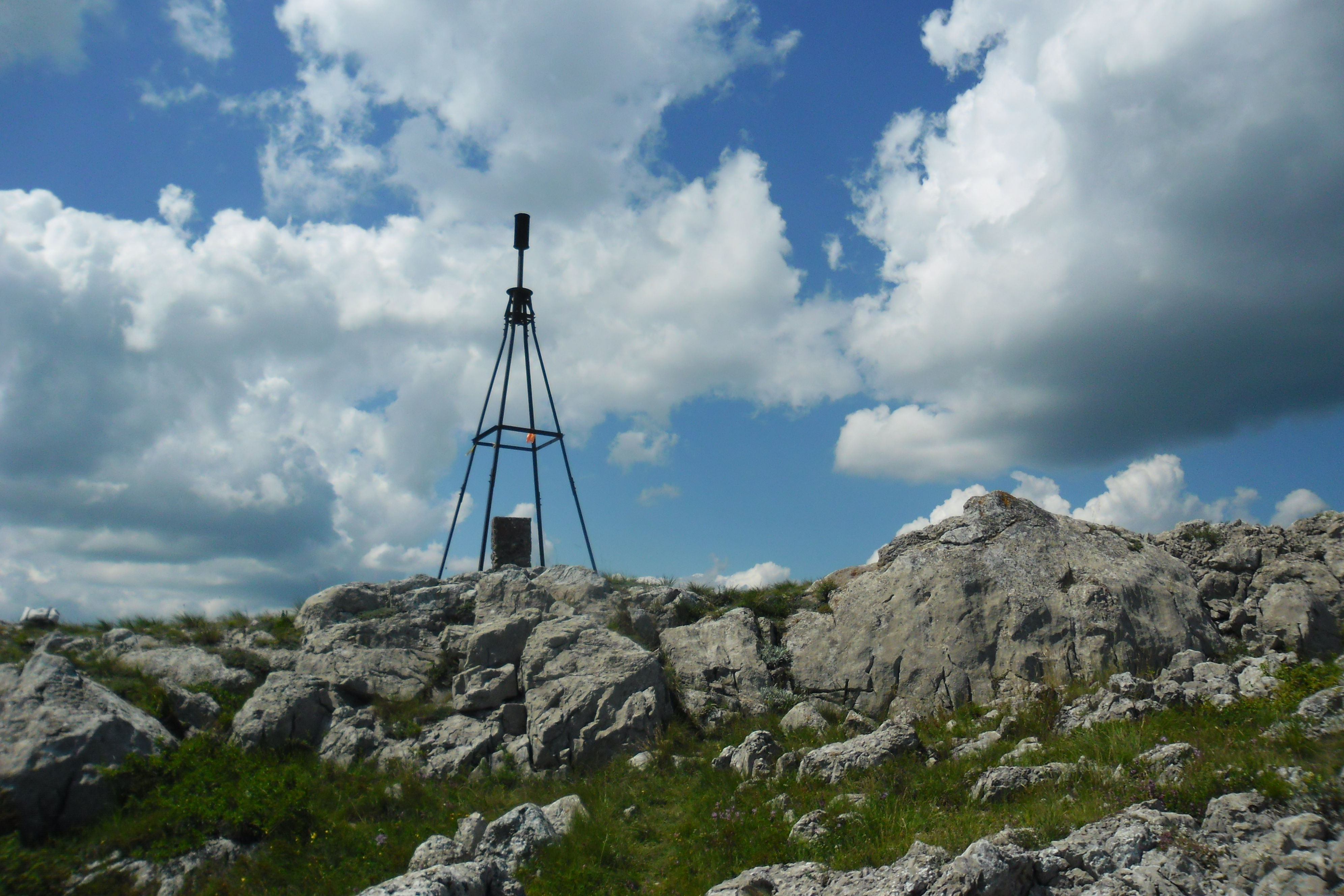 Фото